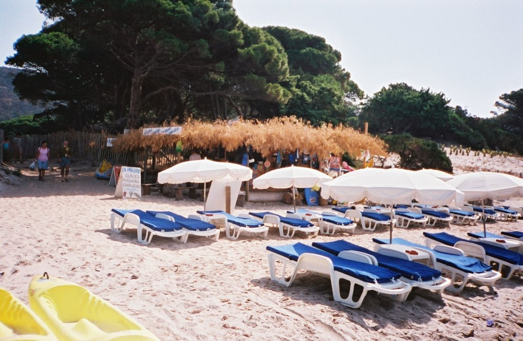 paillotte en bord de mer en Corse